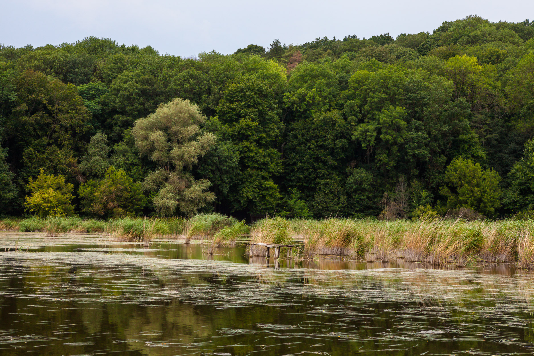 Грабарківський, Могилів-Подільський район, Юрковецька сільська рада, Юрковецьке лісництво, кв. 6-15